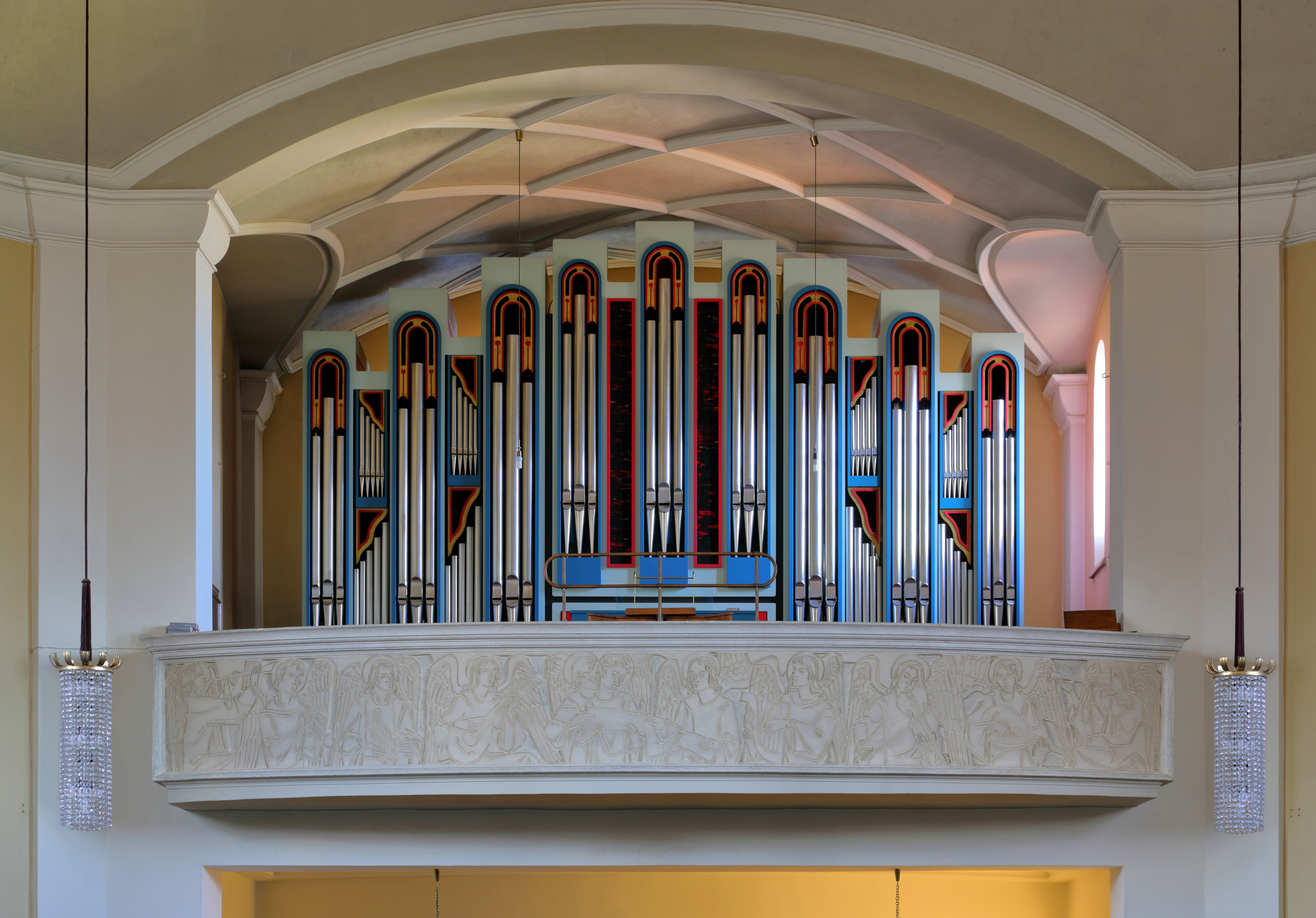 Orgel der Pfarrkirche St. Christoph in der niederösterreichischen Stadtgemeinde Baden.Die Orgel mit 1319 Pfeifen und einem Gesamtgewicht von ca. 3900 kg wurde von Rieger Orgelbau angefertigt und 1997 in Betrieb genommen. Sie hat zwei Manuale, ein Pedal und 21 Register mit einem Tonumfang von C - g3 / C - f1.